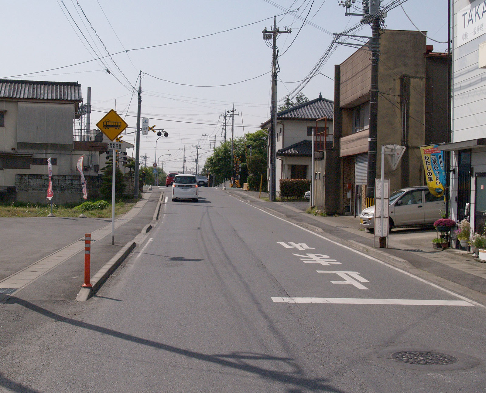 栃木県道183号笹原壬生線（壬生駅付近にて撮影）